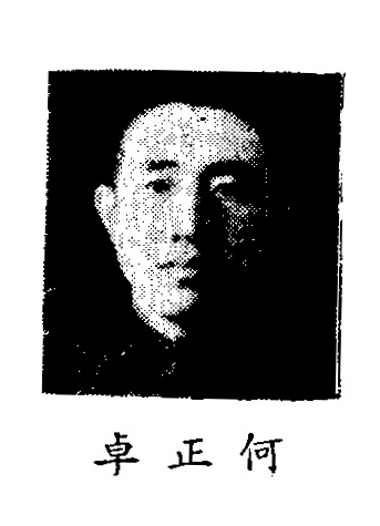 中文（中国大陆）: 制憲國民大會代表